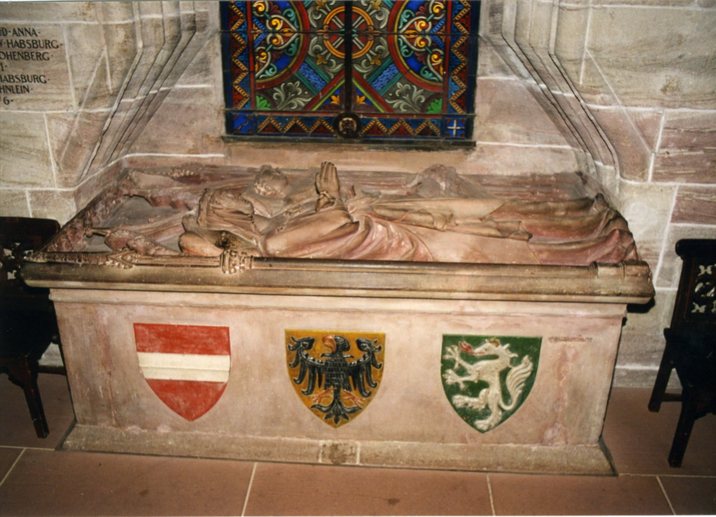 sarcophag Gertrud von Hohenberg